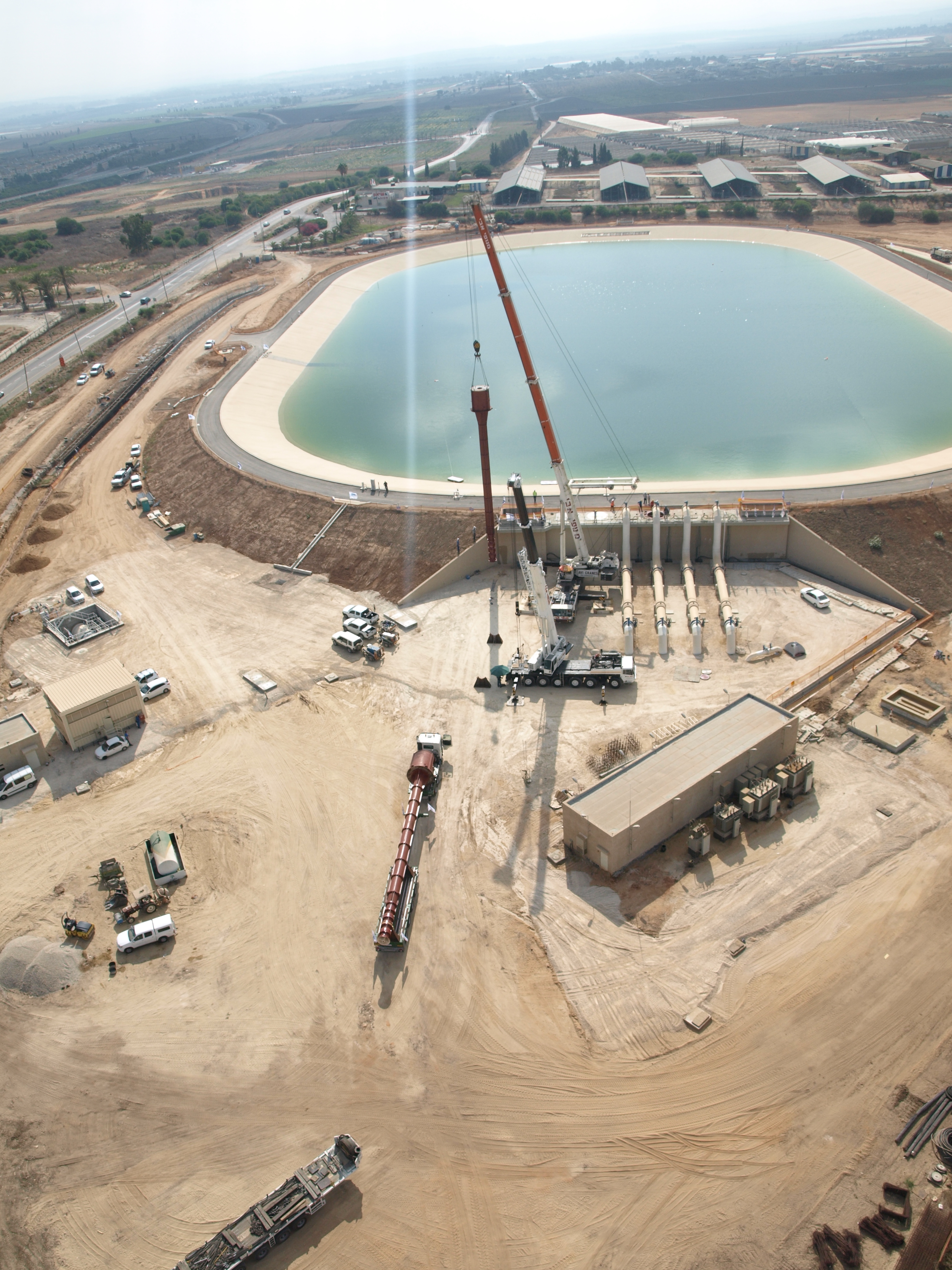 פרויקט חפץ חיים